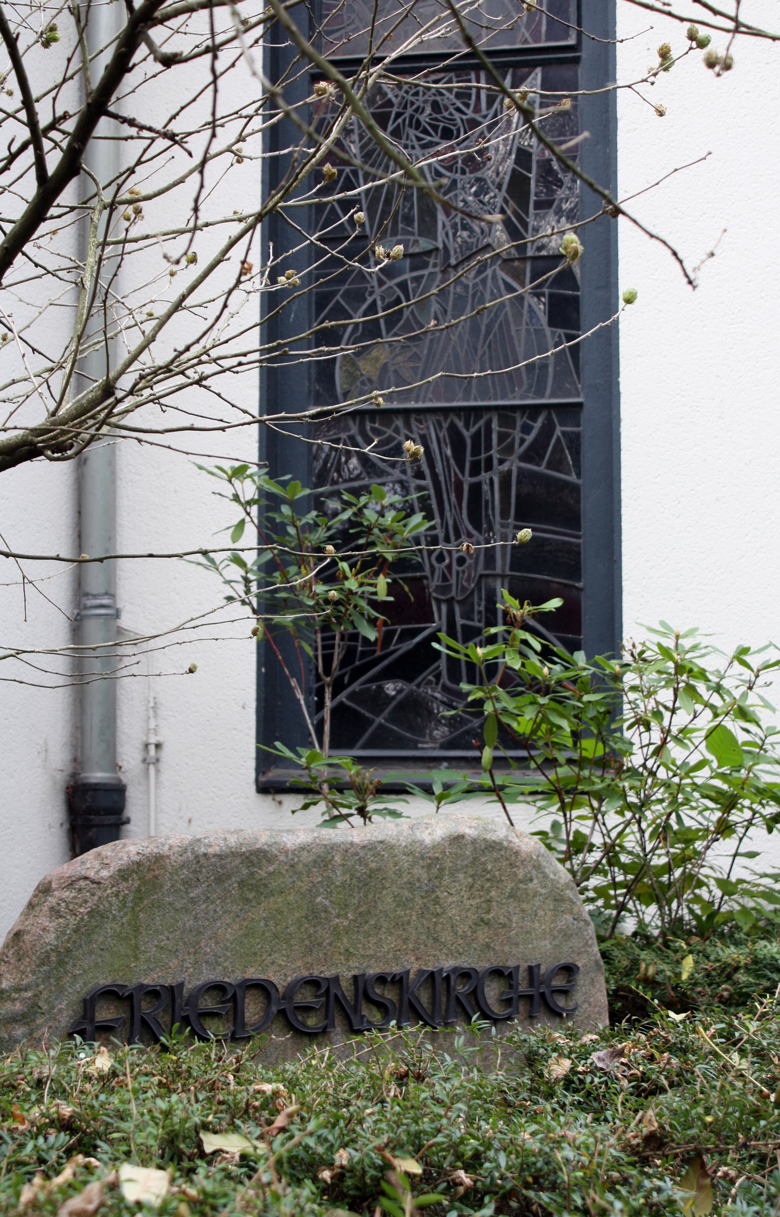 Efferen, Friedenskirche